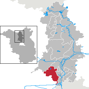 Oberkrämer in Brandenburg (Country) - District Oberhavel